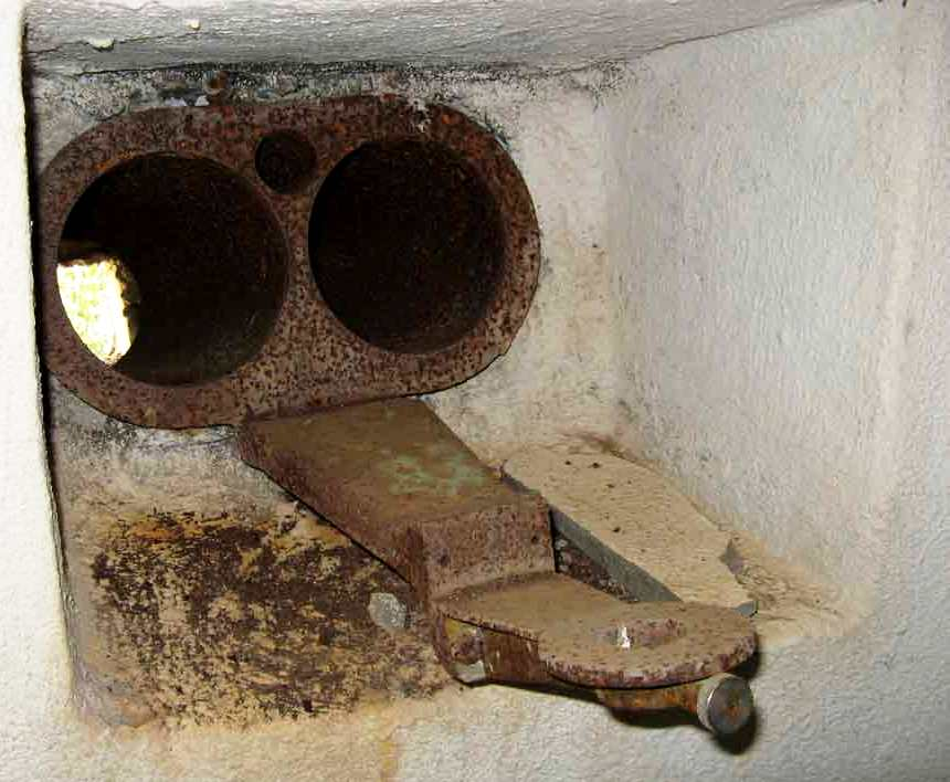 sistema per la comunicazione ottica in un bunker